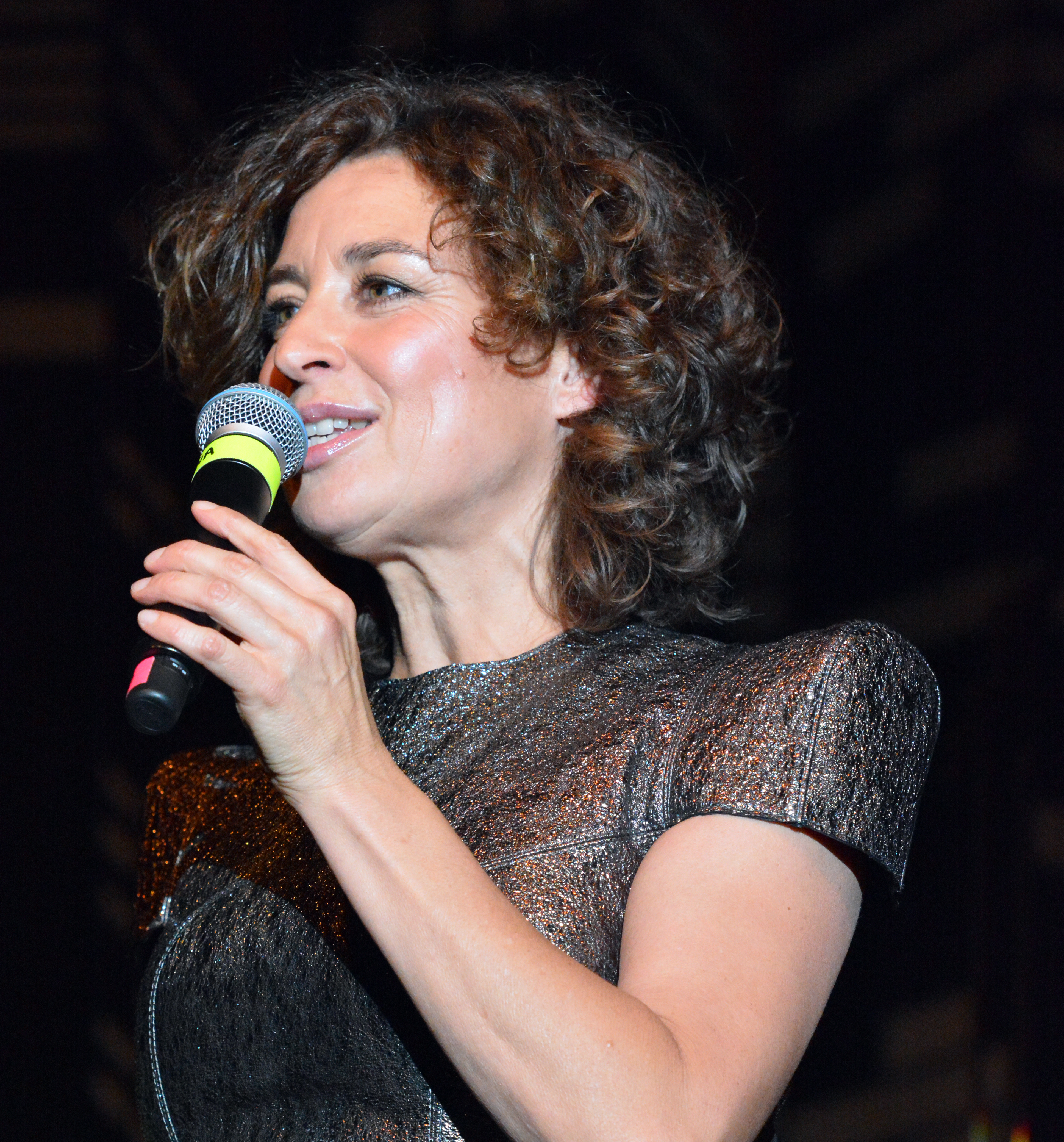 Isabel Varell bei Appen musiziert 2014